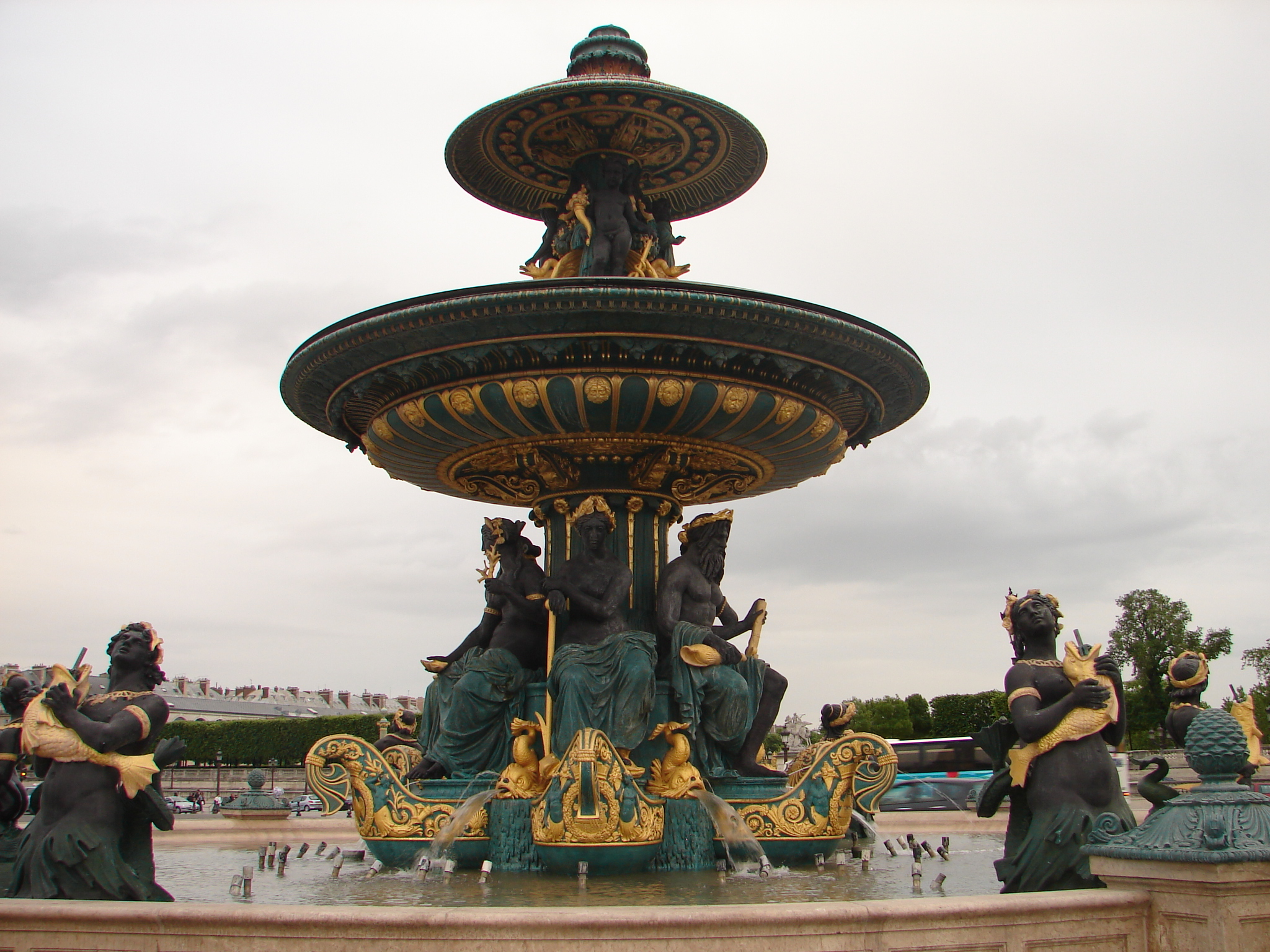 Fontaine de Jacques Hirtoff à la Place de la Concorde